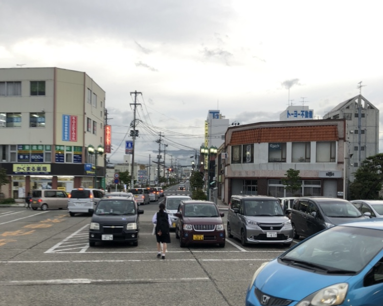 相馬駅より西側を撮影